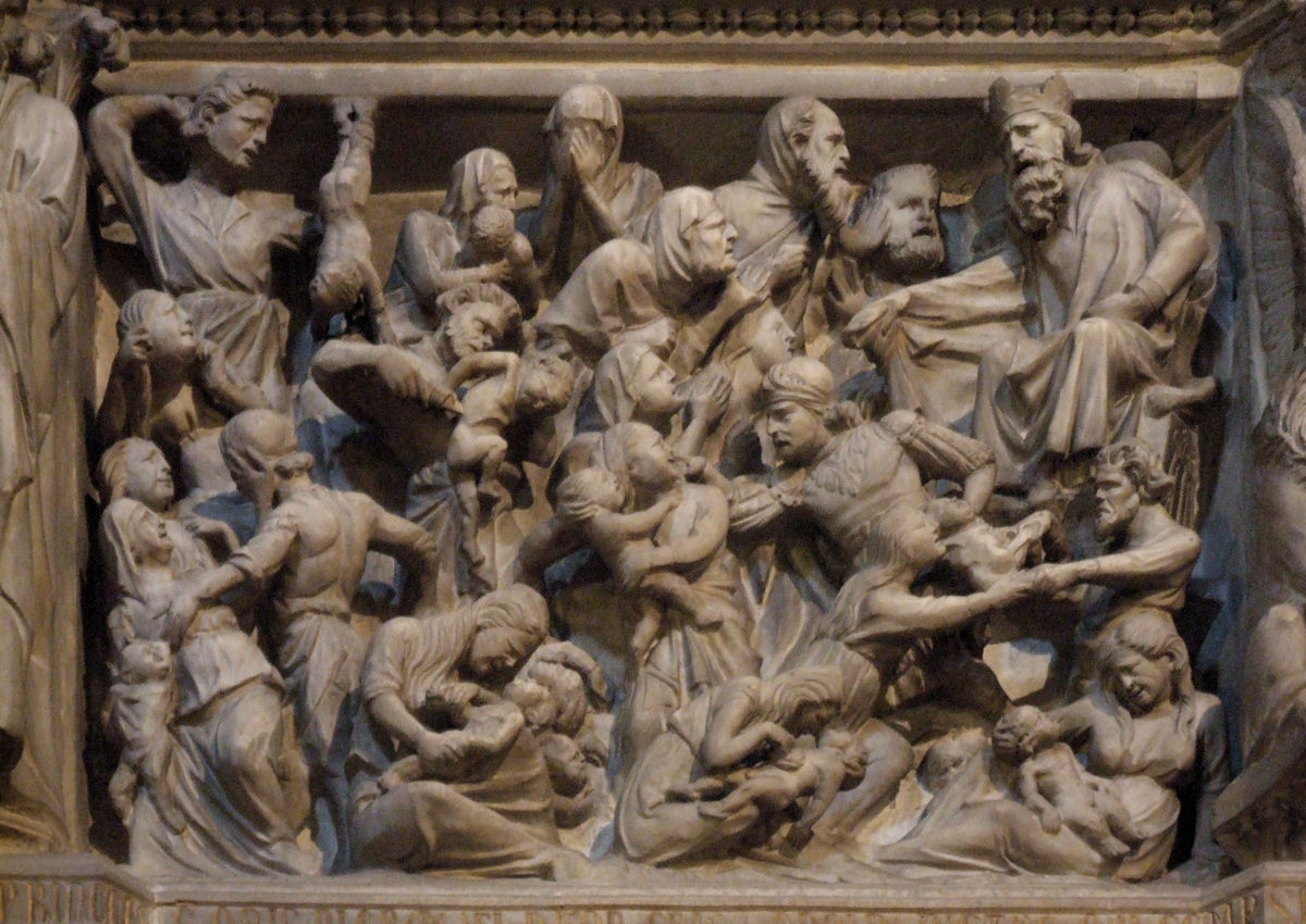 Strage degli innocenti sul parapetto del Pulpito di Sant'Andrea di Giovanni Pisano nella Chiesa Chiesa San Andria, Pistoia, Italy